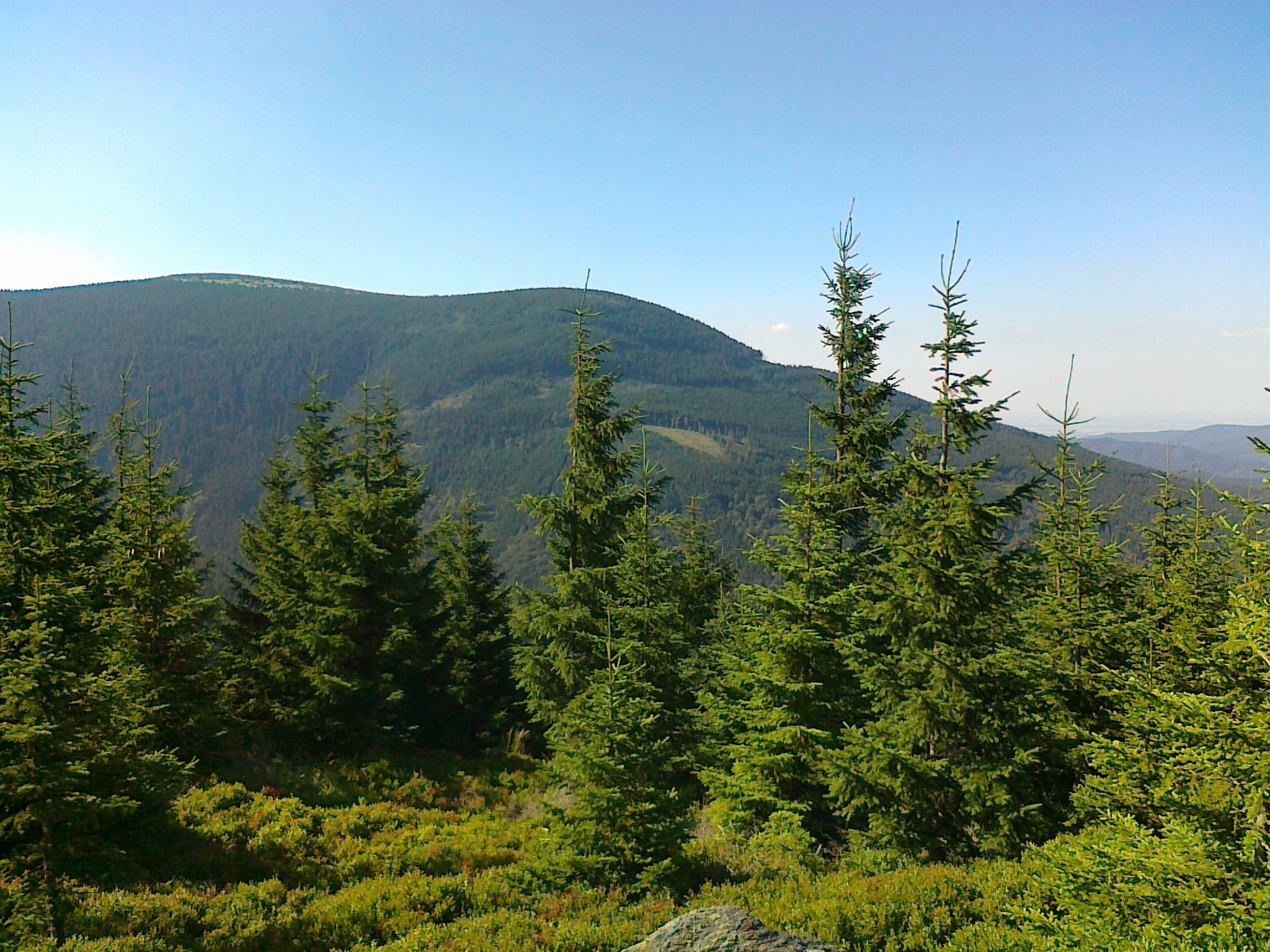 Widok ze skaliska szczytowego góry Točník - 1146 na góry Keprník - 1423 m i Žalostná - 1353 m